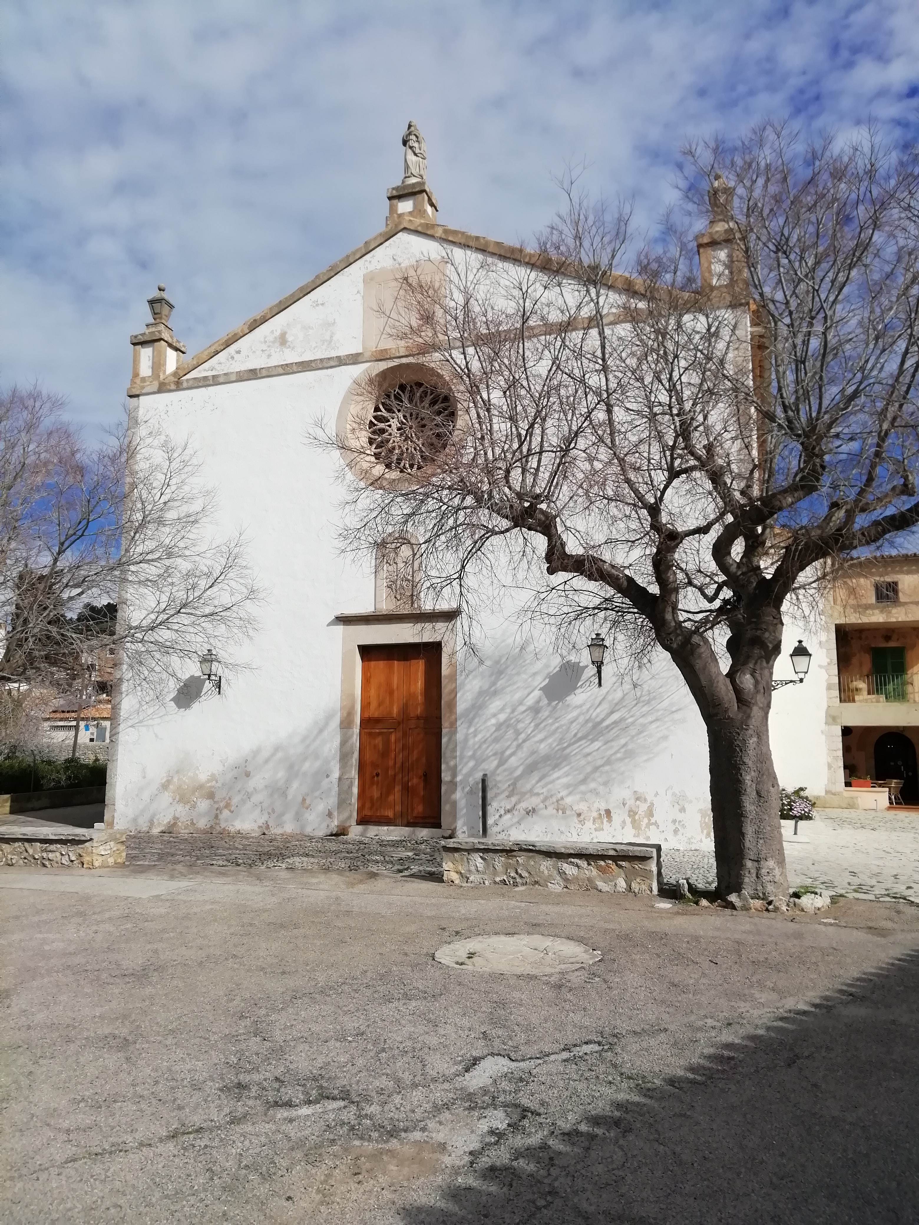 Iglesia del pueblo español Galilea, en Mallorca.